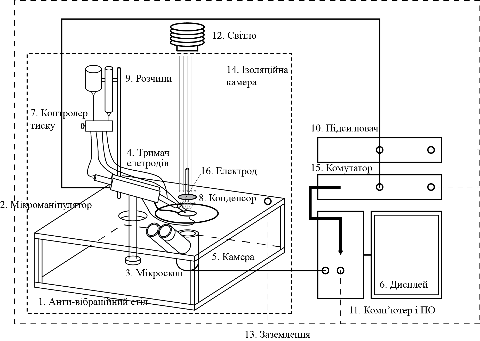 Блок схема установки Patch-clamp. Інститут фізіології імені Олександра Олександровича Богомольця НАН України